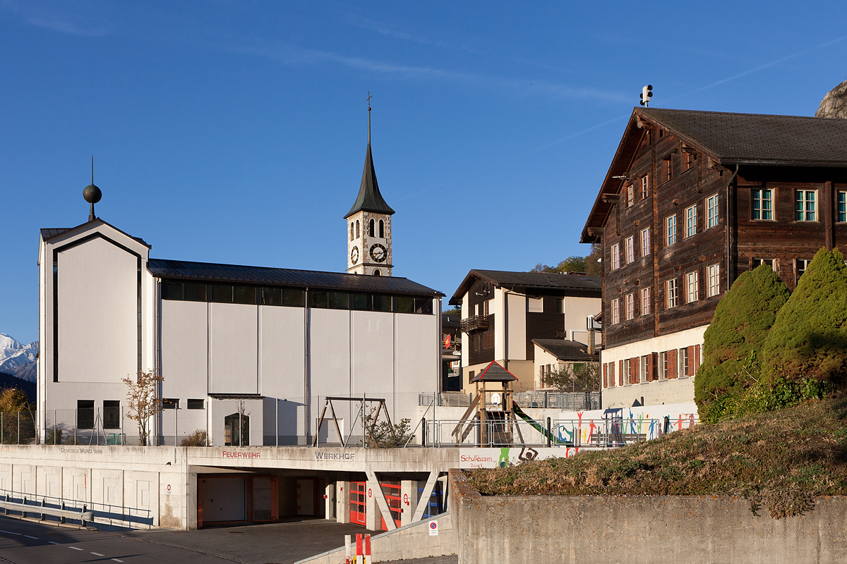 Kirche St. Jakob und Schulhaus in Mund, dem Safran-Dorf